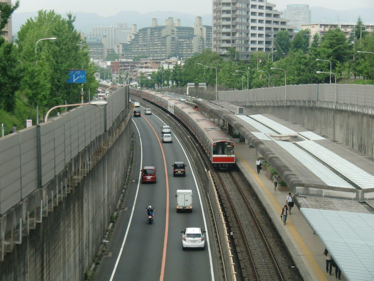 北大阪急行を走る御堂筋線車両